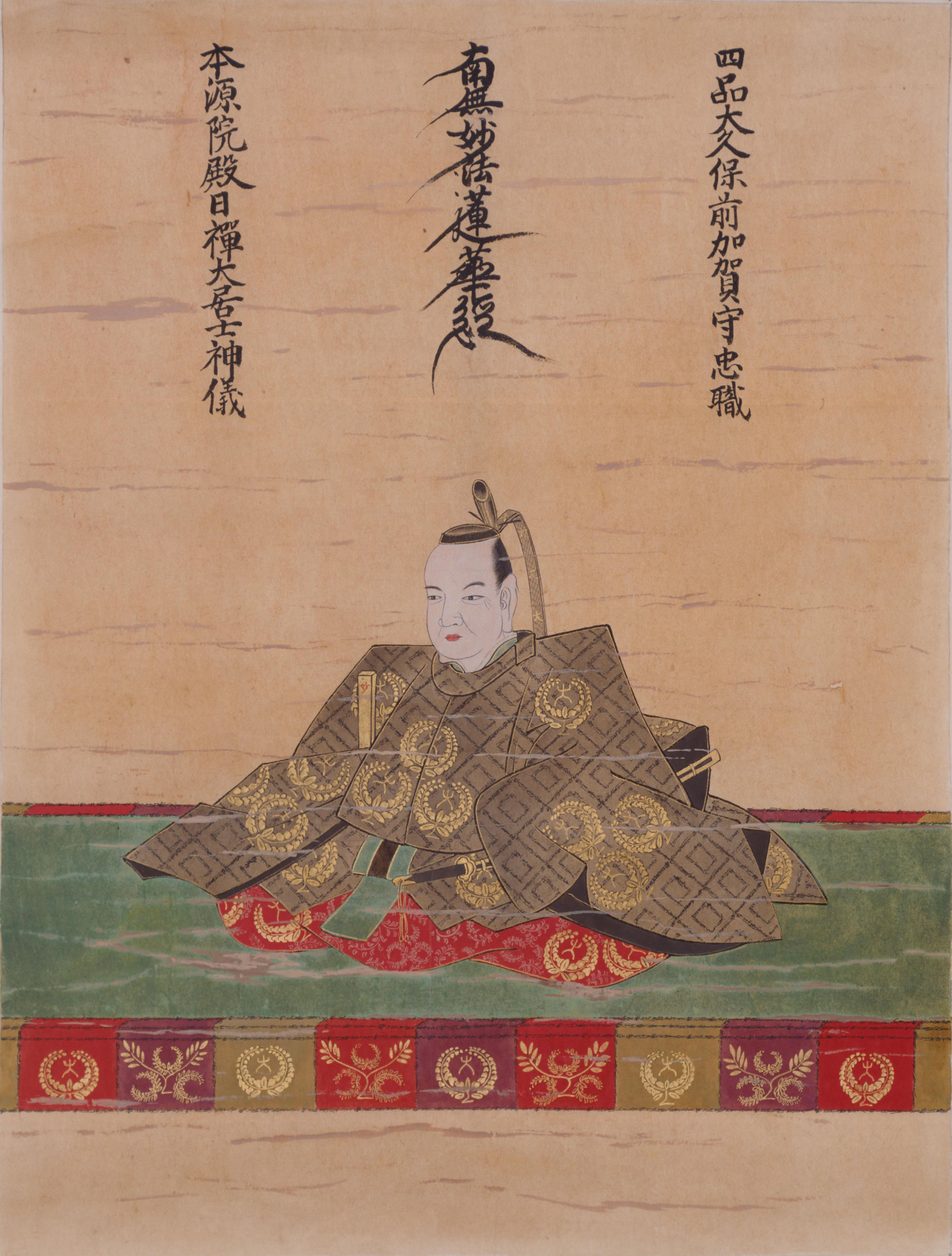 大久保忠職の肖像。